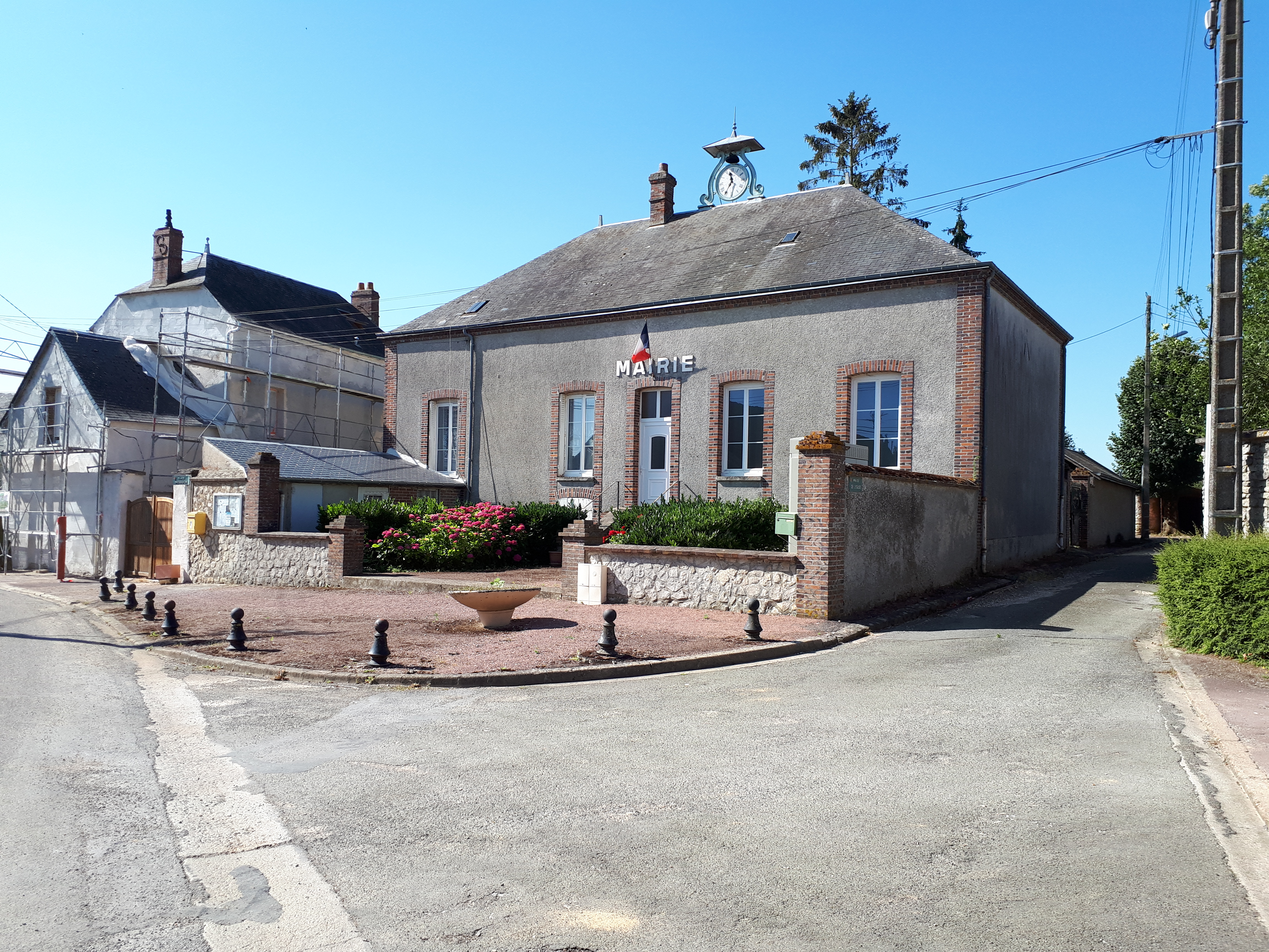 Mairie de Mondonville-Saint-Jean.